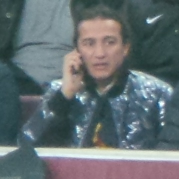 Sedat Yeşilkaya